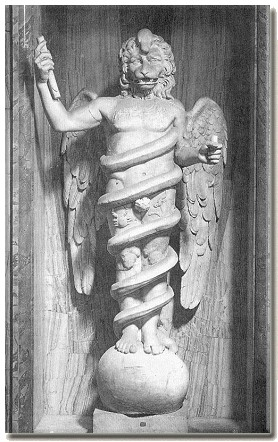 Перси, прибічники зурванізму поклонялися Зурвану (Зурвану). Змій, шакал, людина (двостатева істота) - борець з нечистю, якого перси називали Зурваном. Зурвани (Зервани) брали на себе місію чистити землю від всякої нечисті.